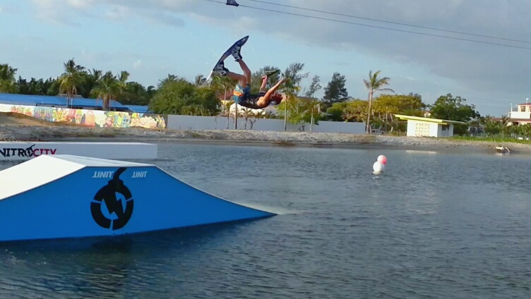 Tablaestela